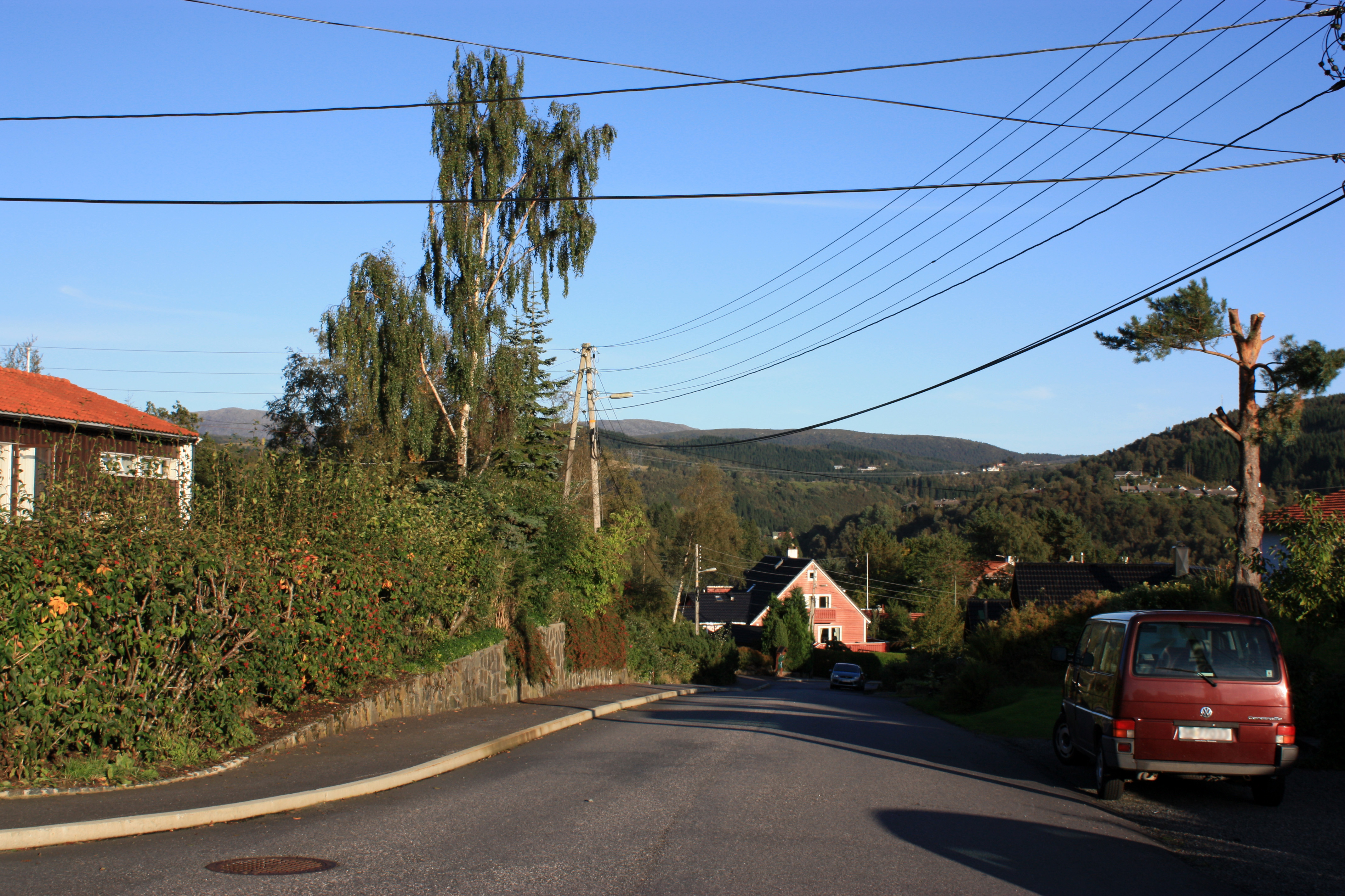 Stemmelia, Fana, Bergen.